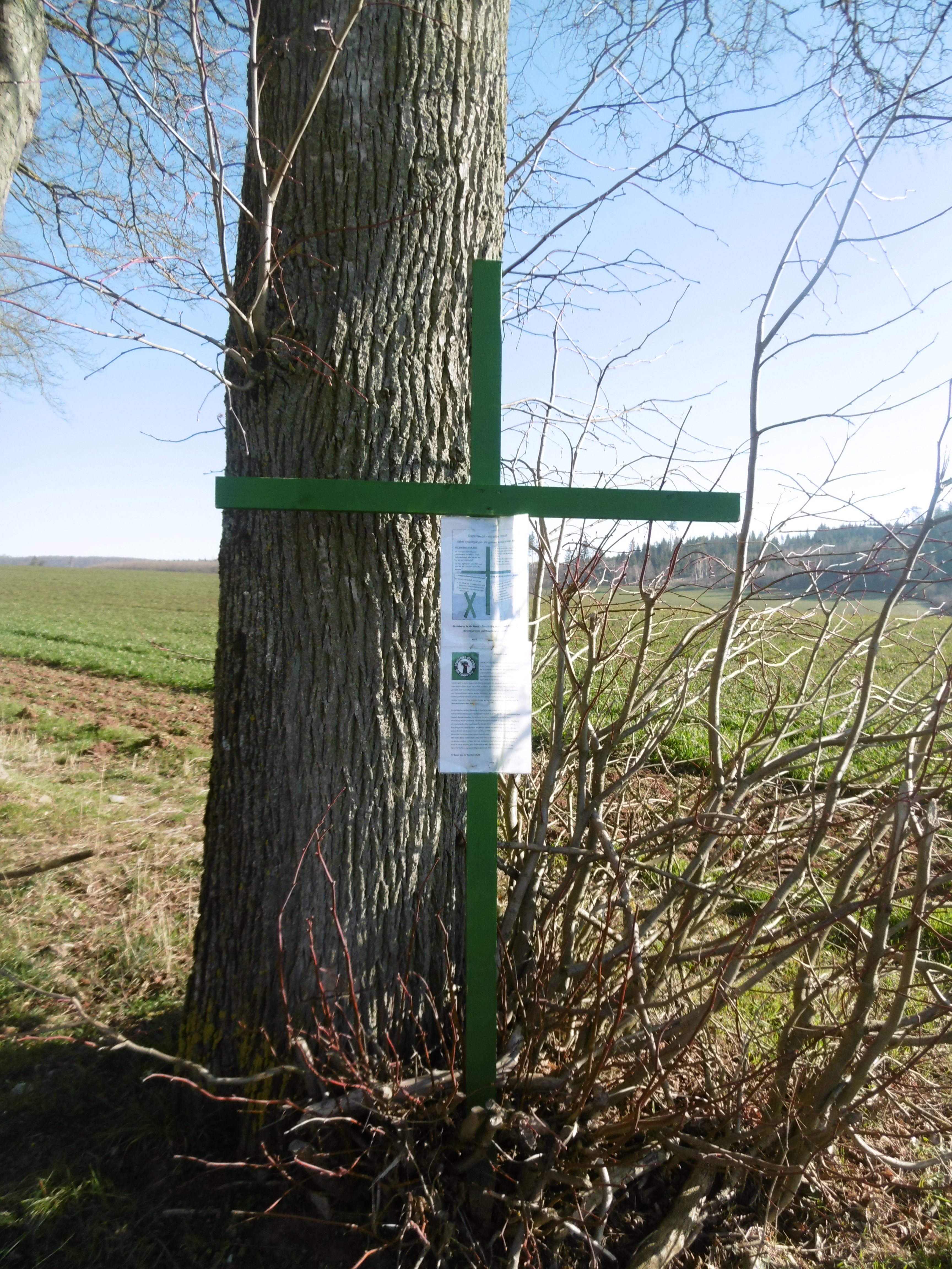 Kreuz der Aktion Grüne Kreuze im Landschaftsschutzgebiet Freiflächen bei Oesdorf / Westheim und Krähengrund südöstlich Marsberg-Oesdorf ((Sauerland, NRW); steht an Baum vom Geschützten Landschaftsbestandteil Allee nördlich des Rosenberges.